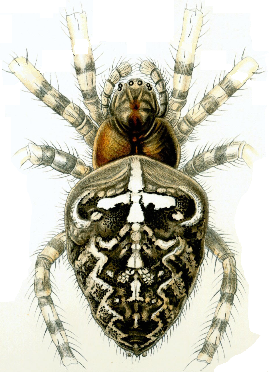 Epeira diadema (Linné) = Araneus diadematus Clerck, 1757